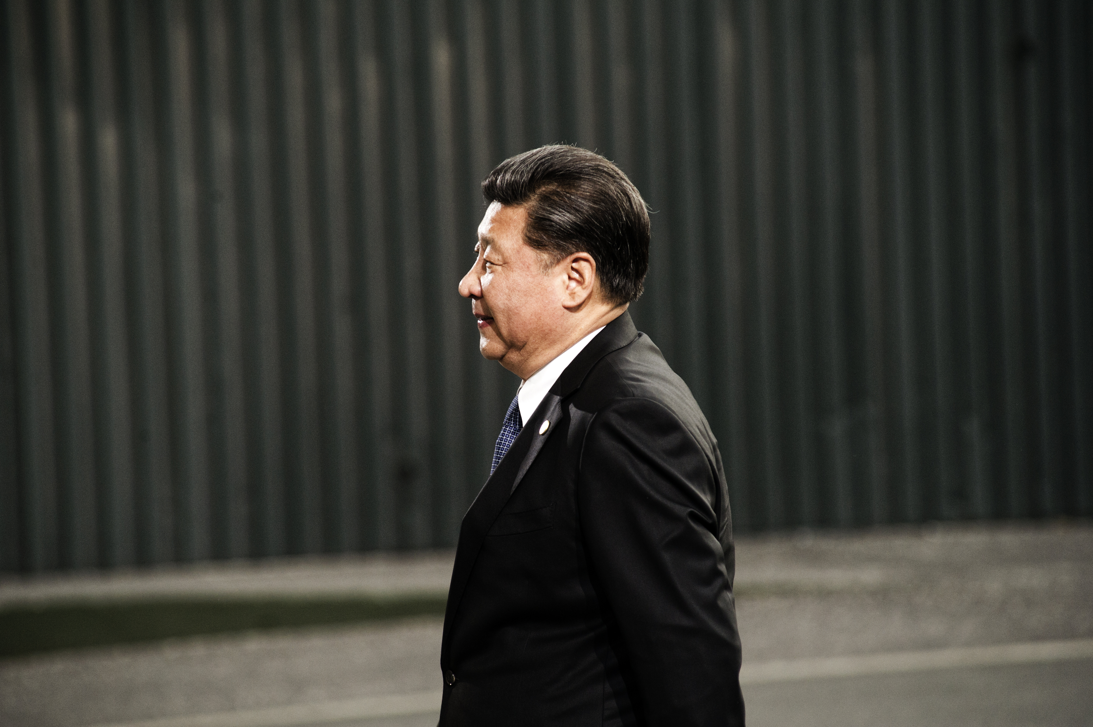 Cop21. Arrivée de Xi Jinping.